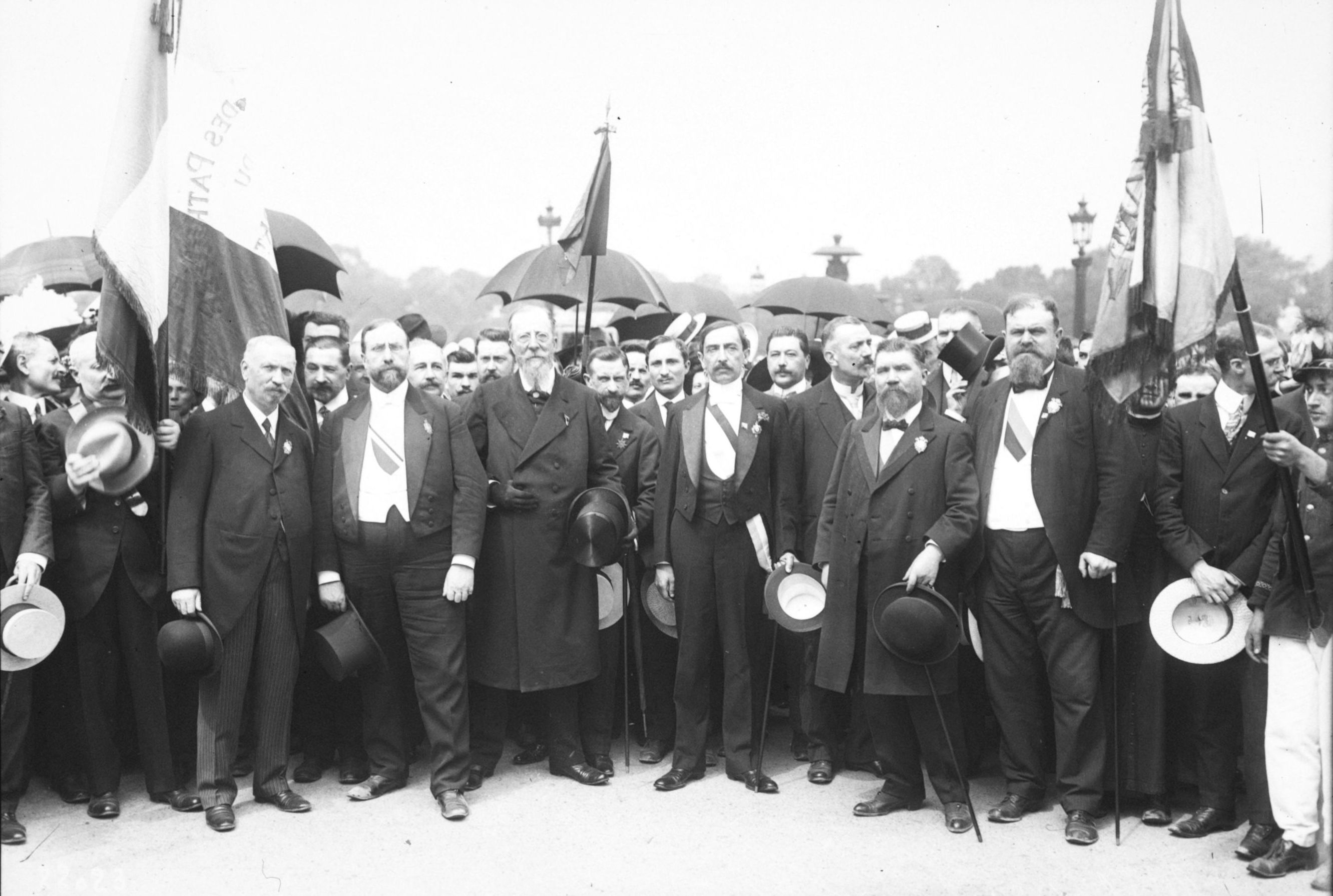 Manifestation de la Ligue des patriotes le 14 juillet 1912. Paul Déroulède (1846-1914) et Maurice Barrès (1862-1923).